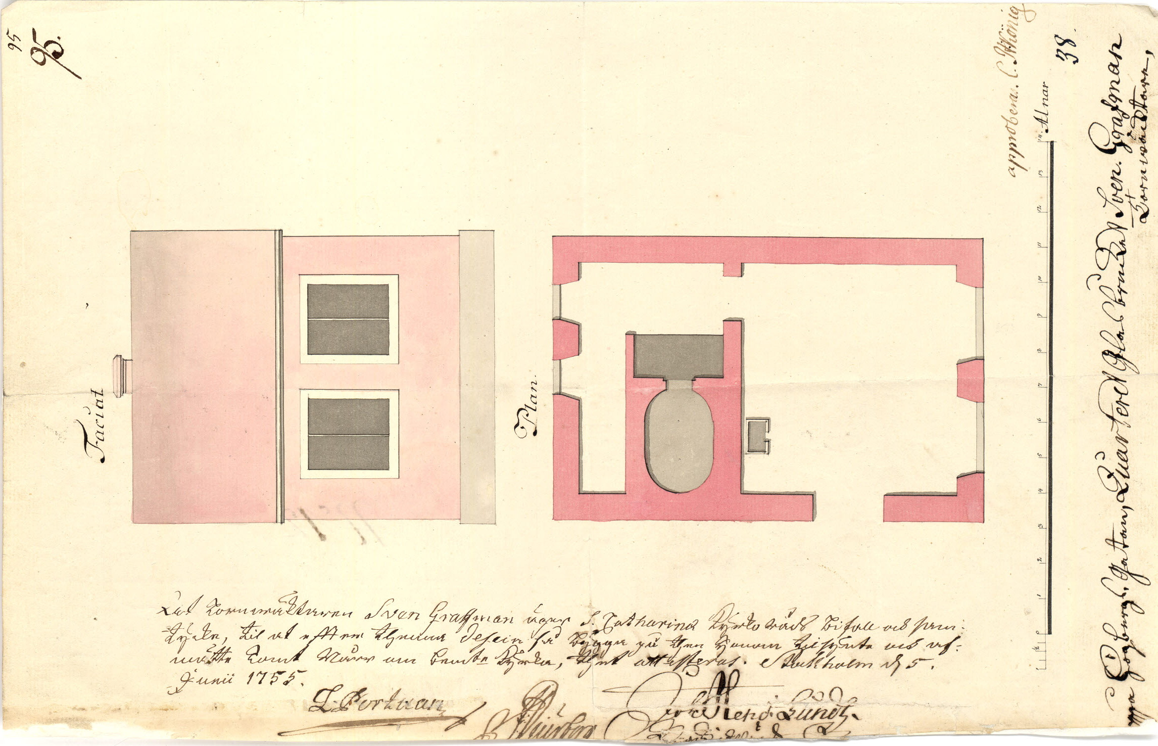 Ritning för byggnad vid Högbergsgatan 14, beställare tornväktare Sven Grafman